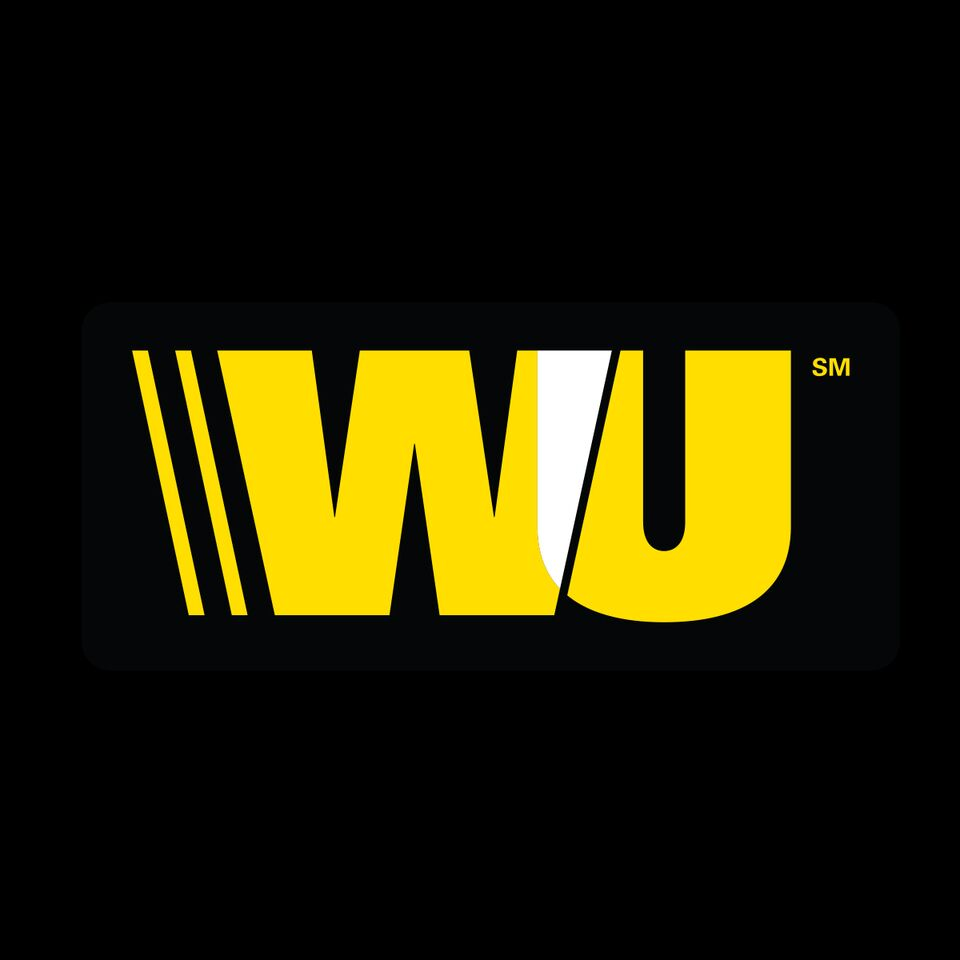 Logotype WU